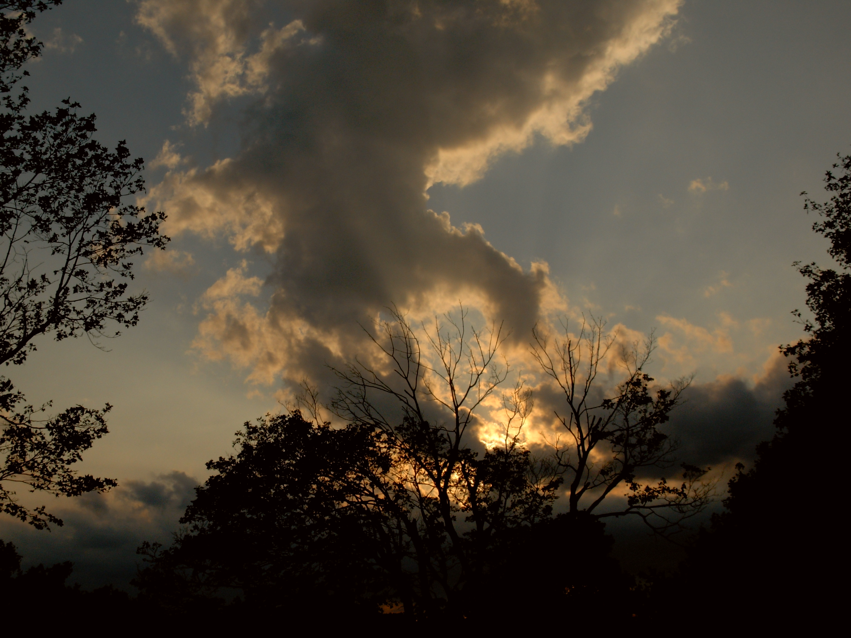 Formation nuageuse rappelant Pégase